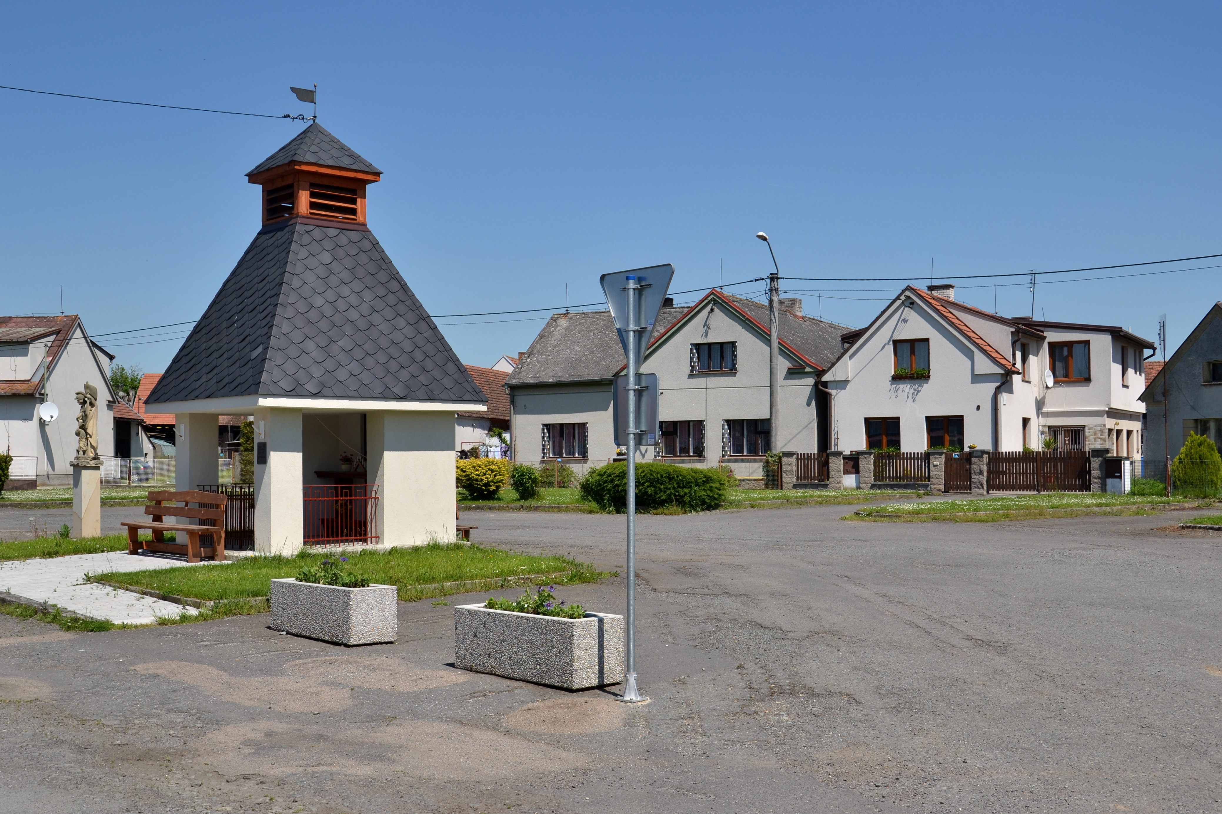 Dolní Hradiště – náves s kaplí